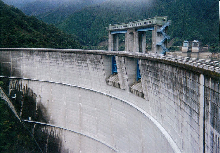 Dam